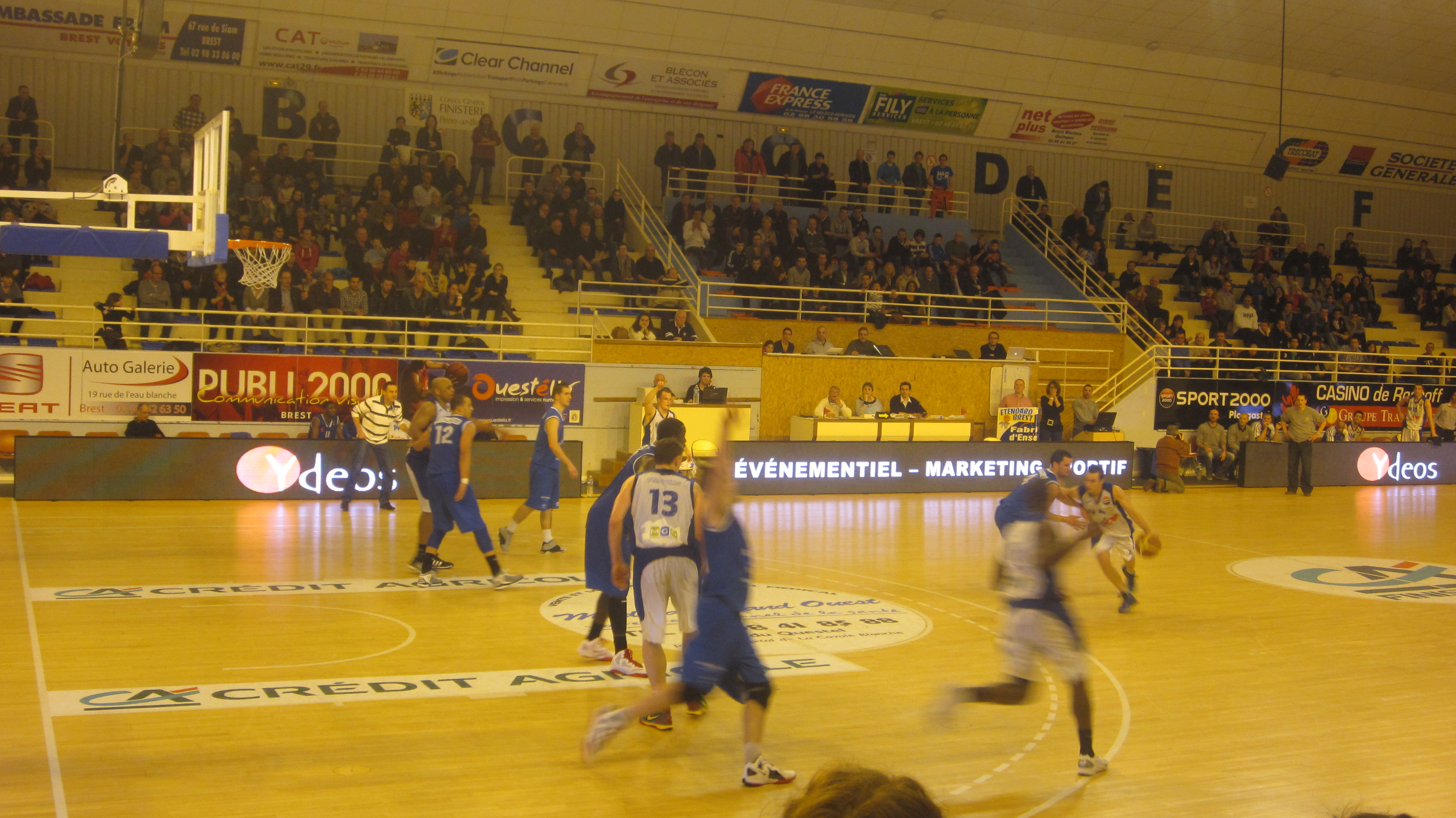 Match de basketball de l'Étendard de Brest à la salle Marcel Cerdan